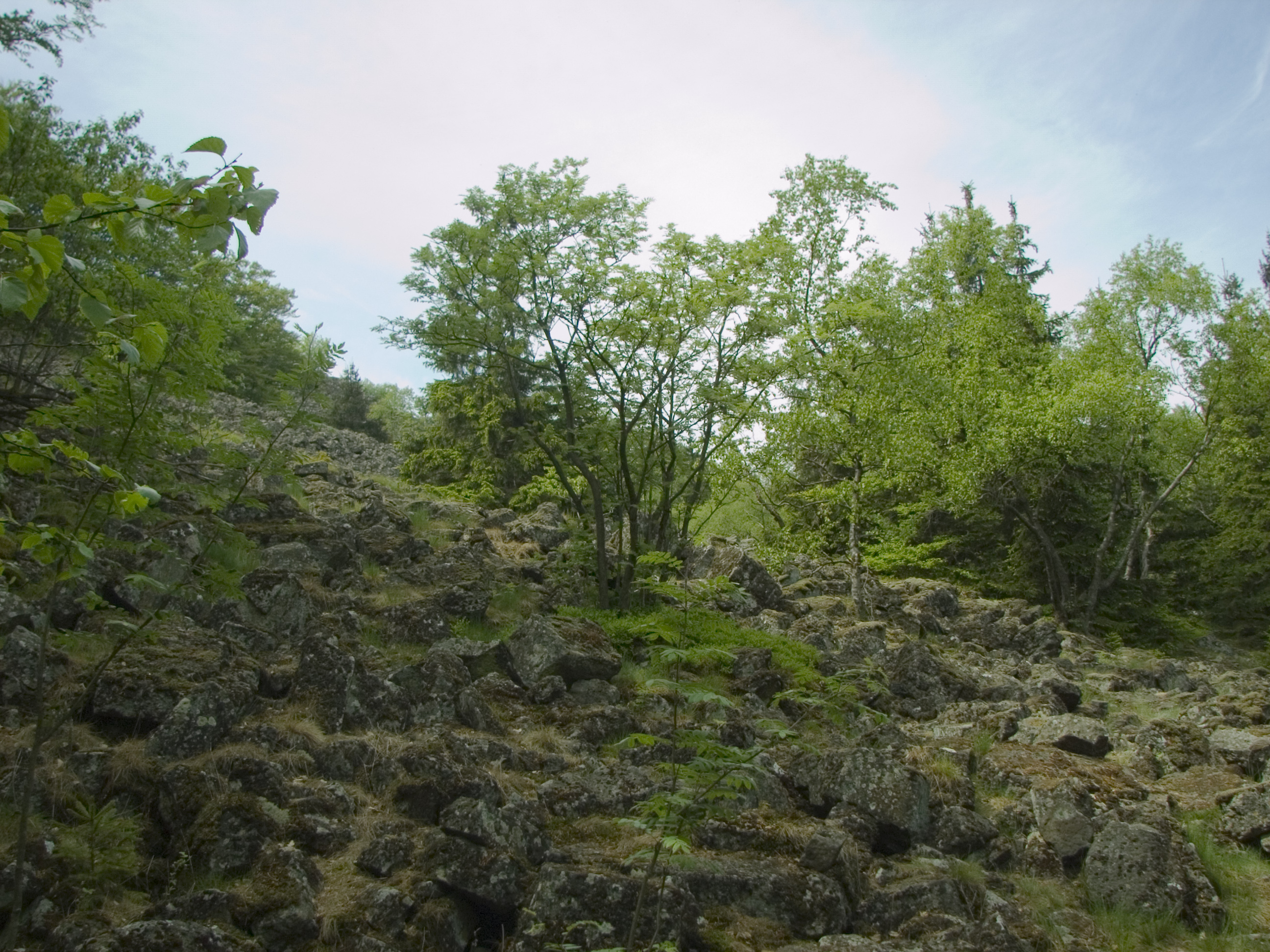 Hoher Meißner, Blockhalde bei Schwalbenthal